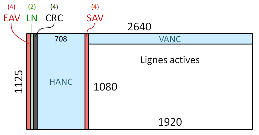 Structure de la trame image du signal HD-SDI dans le cas d'un format 1080 lignes actives et 25 images par seconde.